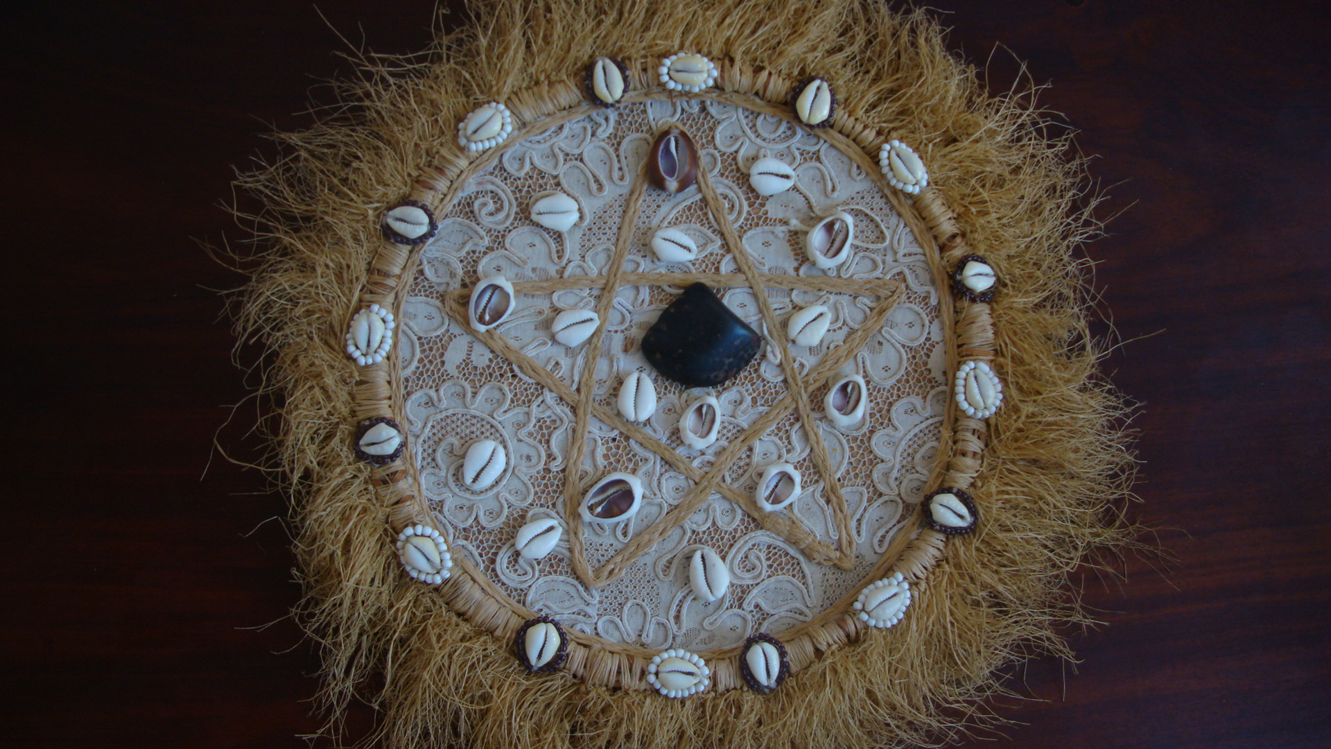 Odu Ossá Merindilogun, Salvador, Bahia, Brasil.